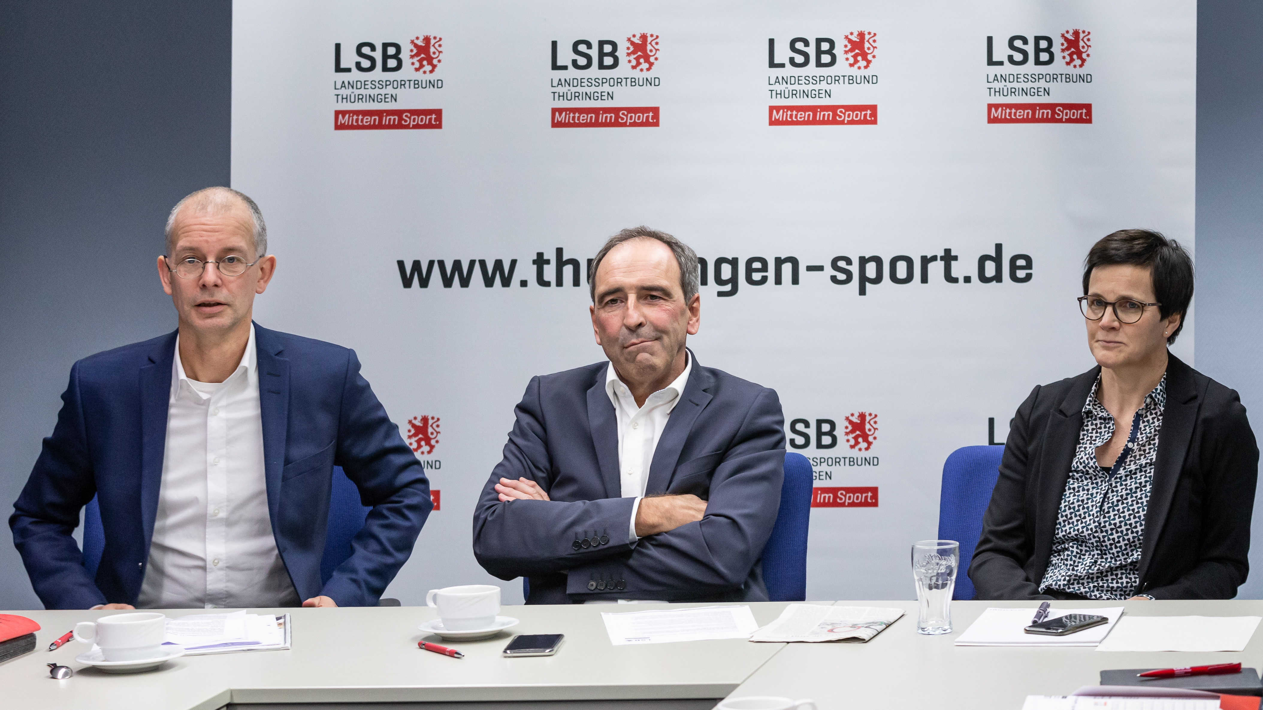 Jahrespressekonferenz des Landessportbundes (LSB) Thüringen; v.li.: Thomas Zirkel, Hauptgeschäftsführer; Prof. Dr. Stefan Hügel, Präsident; Kerstin König, Geschäftsführerin Landessportbund Thüringen